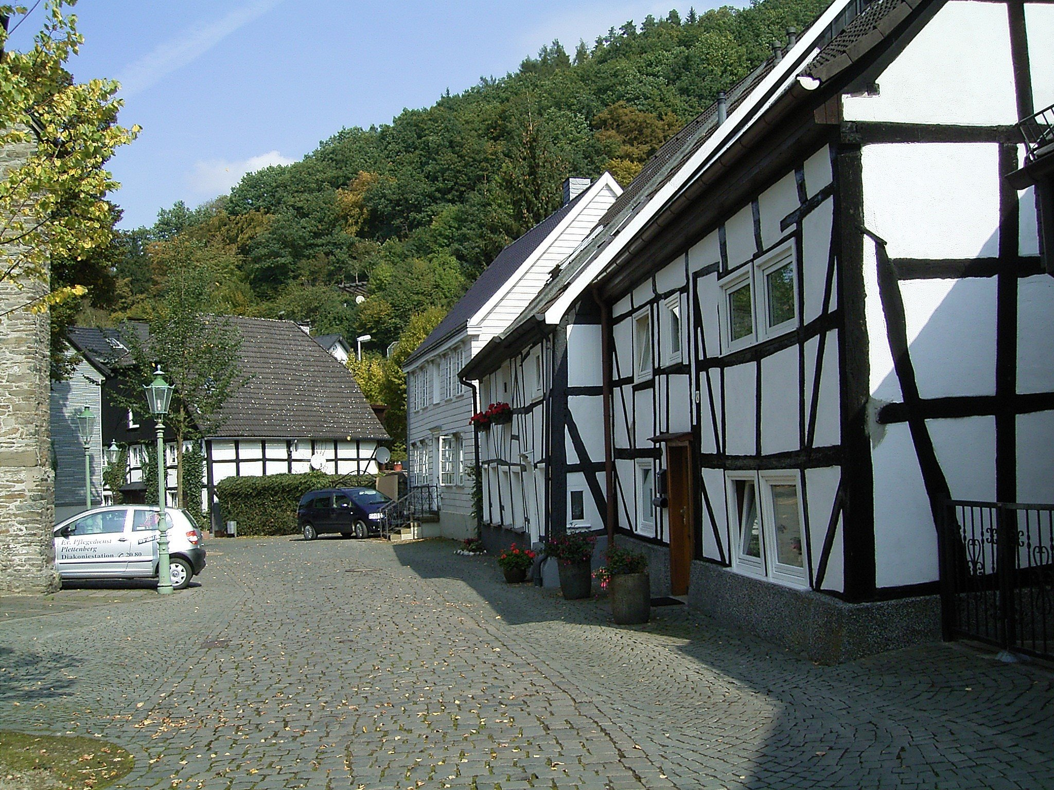 Plettenberg, Teilstück der Kirchstraße.